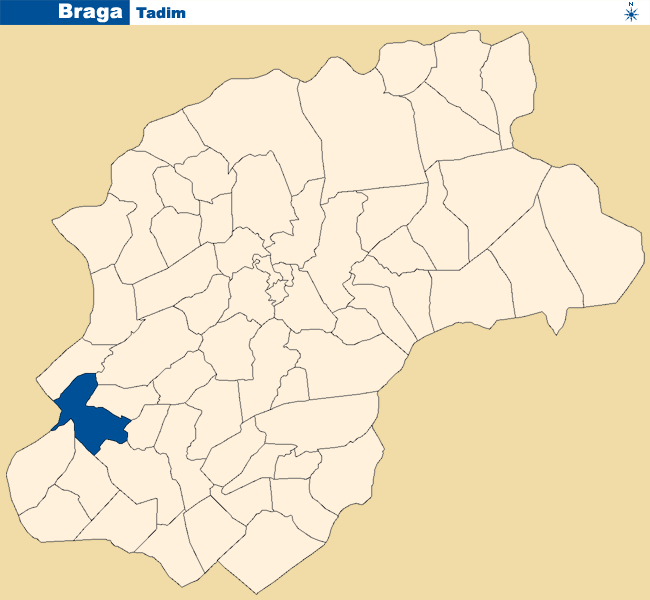 Localização de Tadim no concelho de Braga.